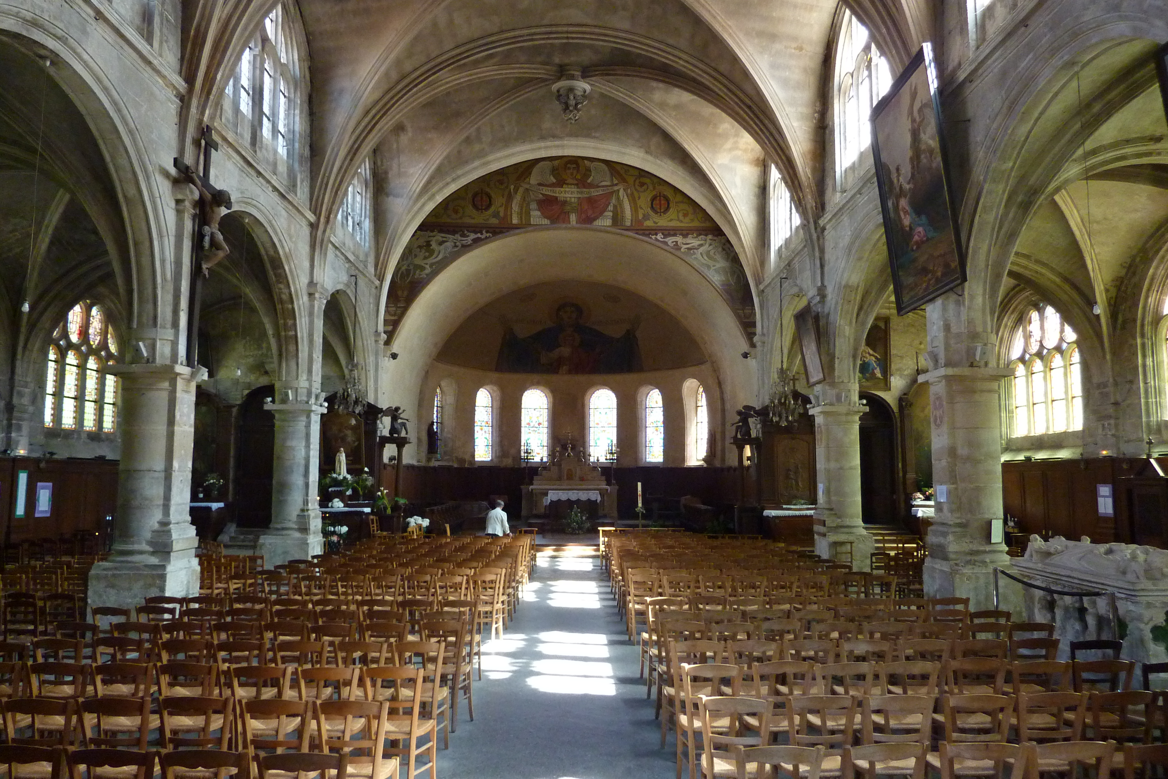 Katholische Kirche Notre-Dame in Pontoise